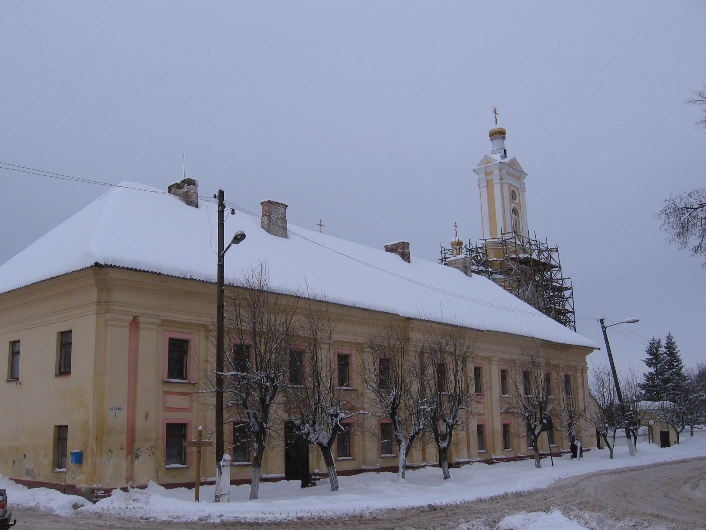 Беларуская (тарашкевіца): Былы кляштар базыльянаў (Ружаны). Жылы кляштарны корпус. This is a photo of Belarusian heritage monument. Reference number: 112Г000643 ( WLM)